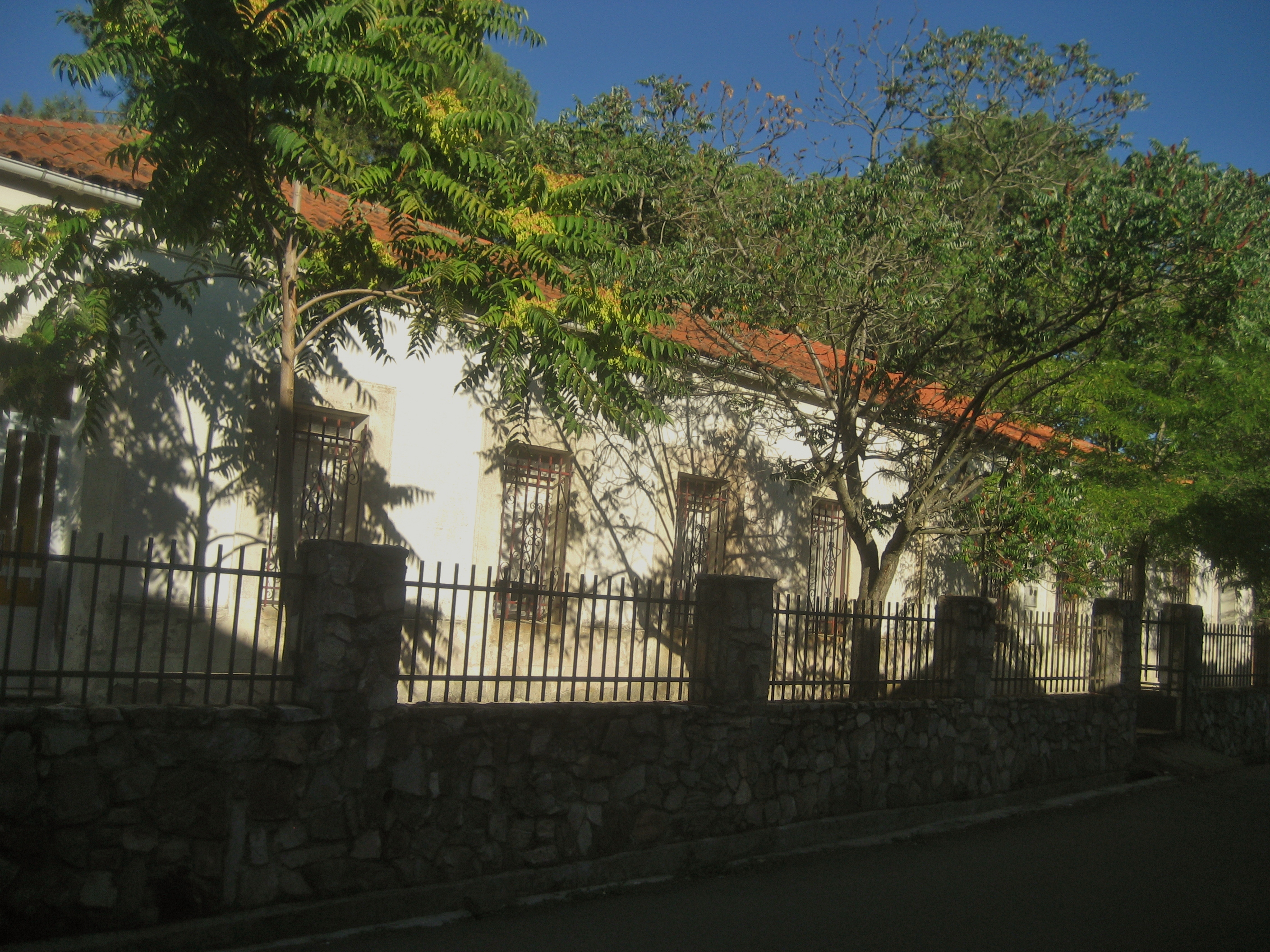 Edificio de Las Escuelas (Cereceda de la Sierra)